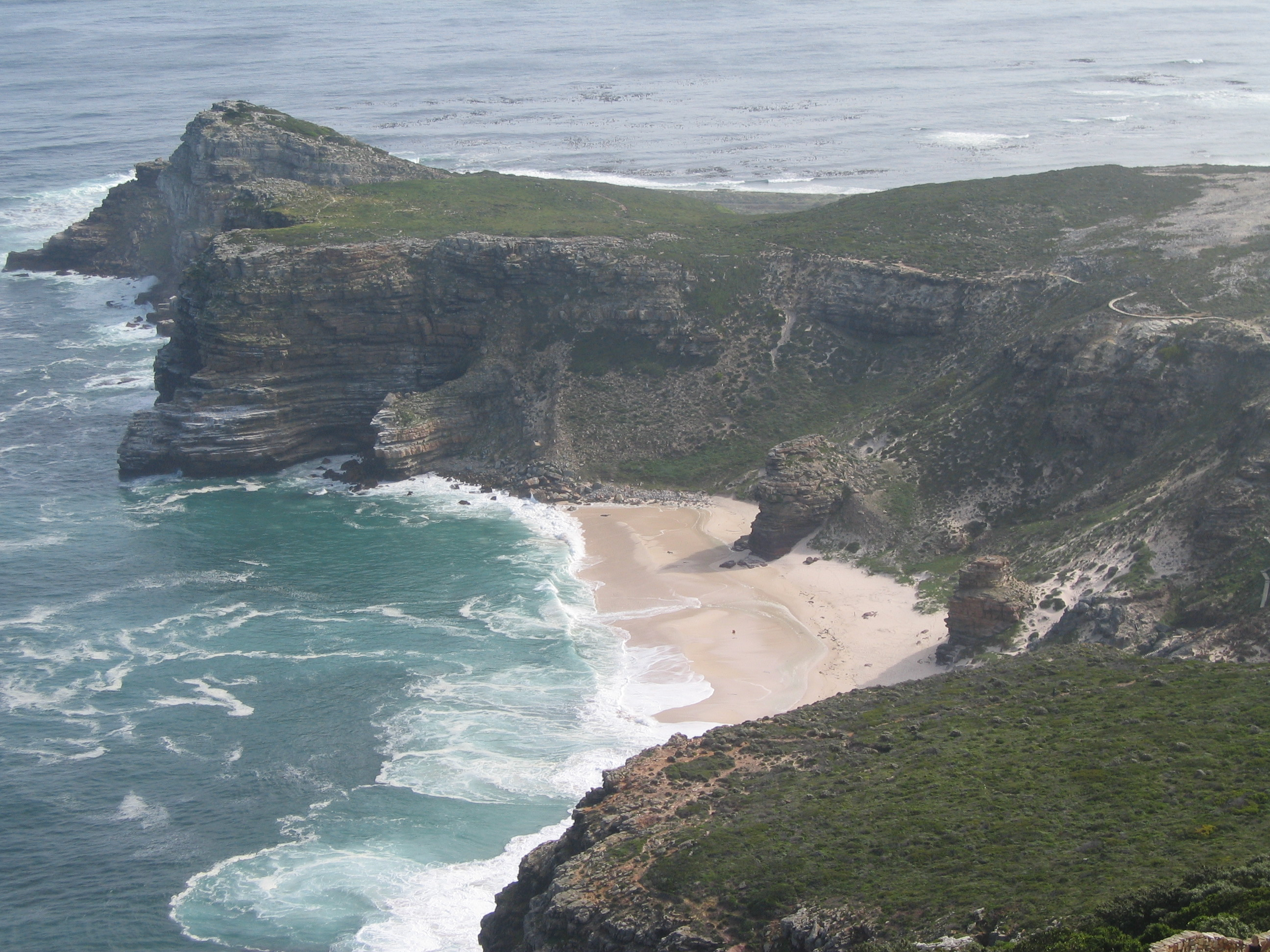 Südafrika am Kap der Guten Hofnung. Dieser besondere Ort trägt seinen Namen zurecht, da sich früher die Handelsschiffe gute Hoffnungen auf ein sicheres Erreichen des Ziels machen konnten nachdem sie das Kap passiert hatten. Auf Grund der vielen, versteckten Riffe bestand höchste Sinkgefahr!